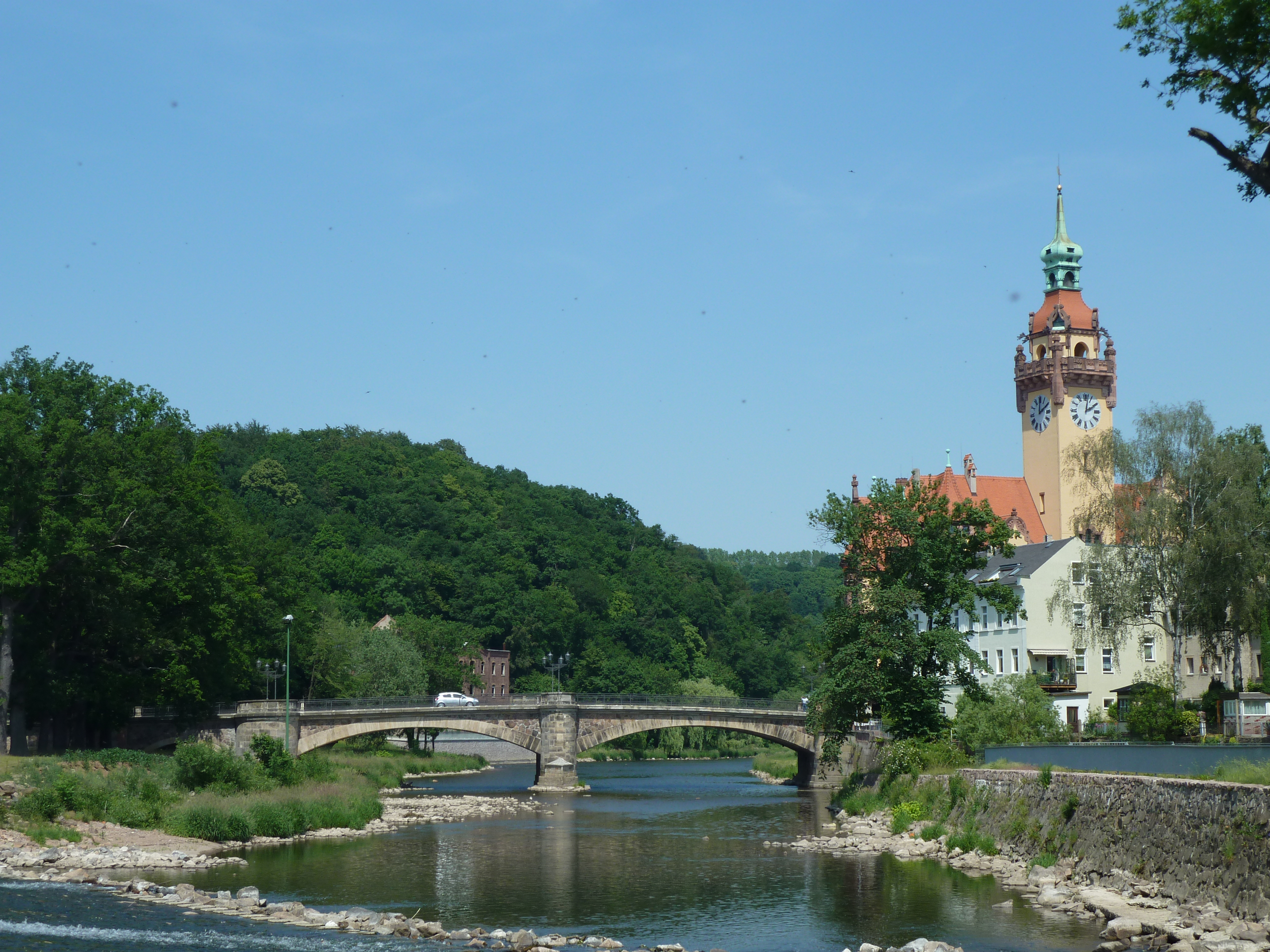 Zschopaubrücke und Rathaus in Waldheim